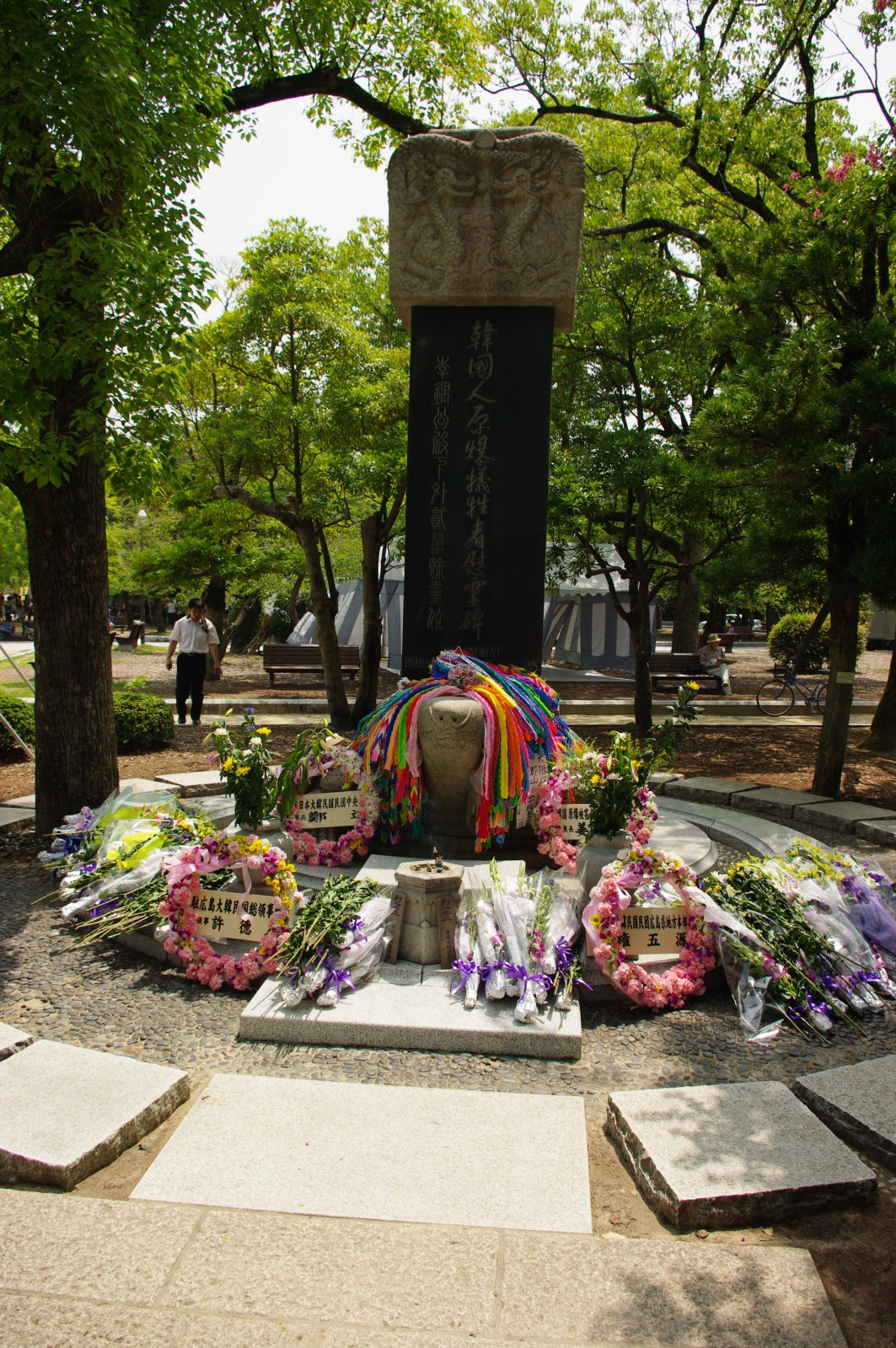 Mahnmal für koreanische Kriegsopfer in Hiroshima